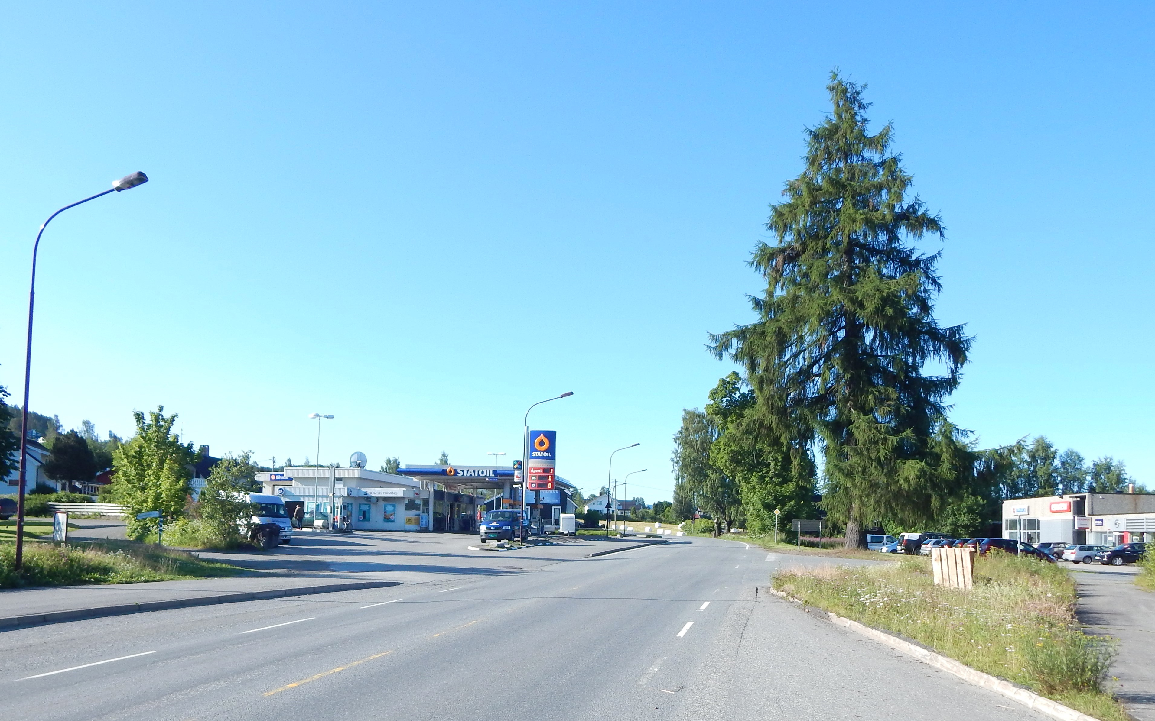 Søre Ål på Lillehammer